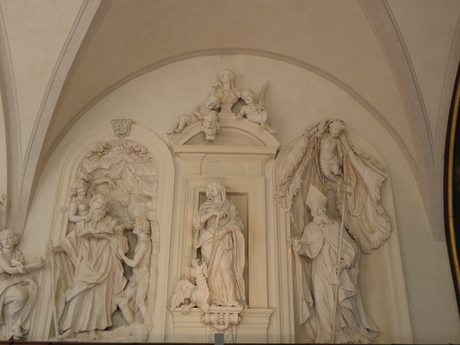 Saint-Antoine ermite, Sainte-Marguerite, Saint-Ennemond. Sculptures du réfectoire du Palais Saint-Pierre de Lyon (69). .